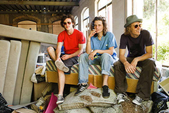 Mother's Cake